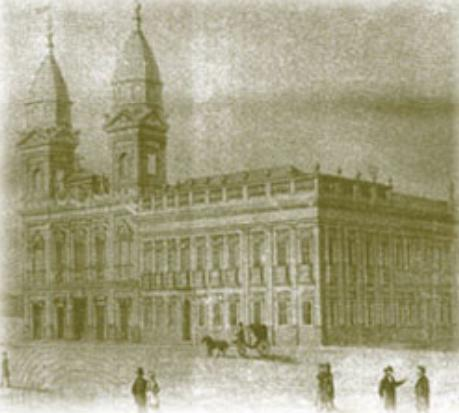 Fotografia antiga da Santa Casa de Misericórdia de Pelotas.